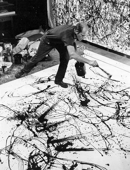 Джексон Поллок в процесі дриппінгу